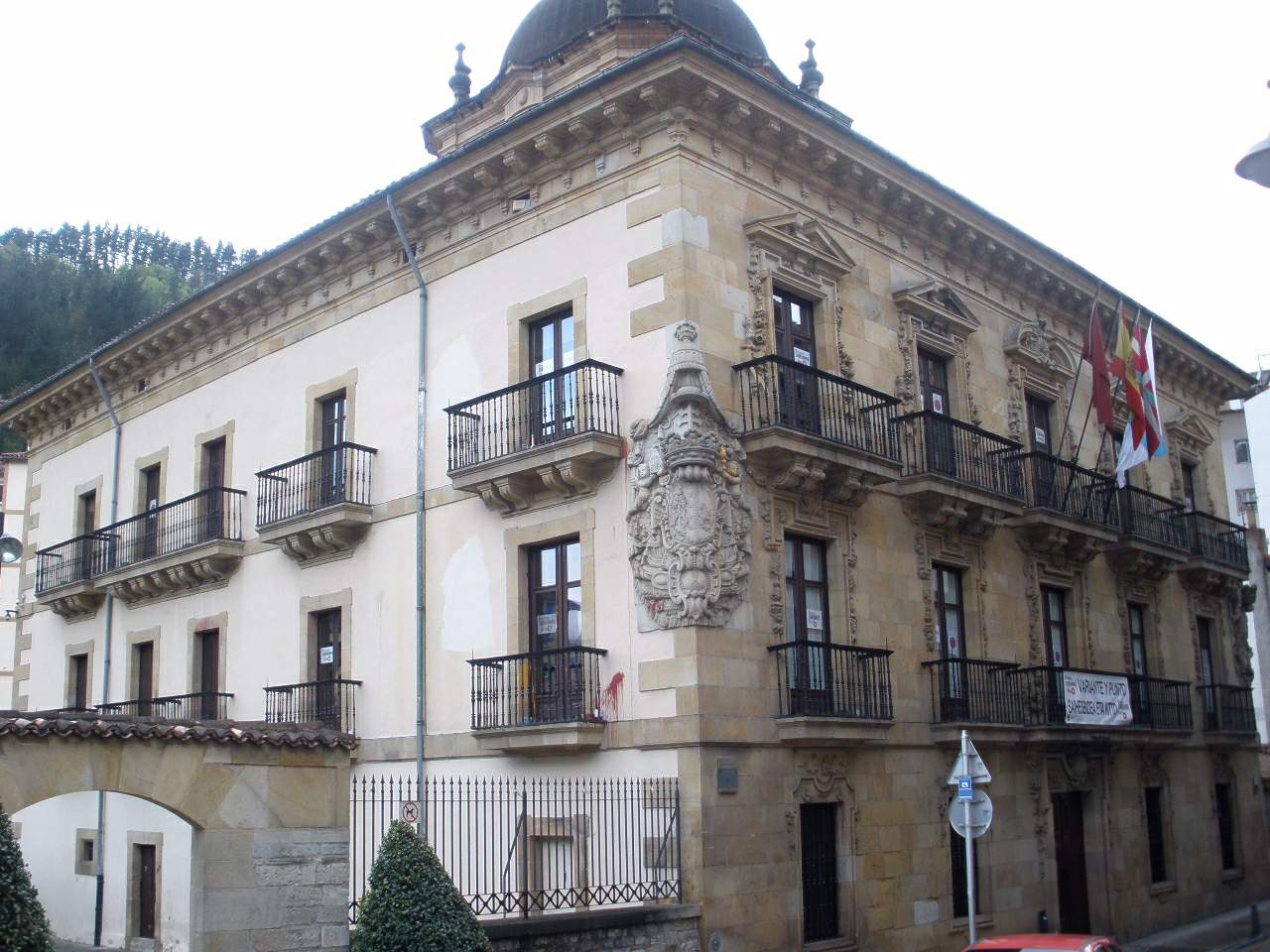 Ermua, Bizkaia - Ayuntamiento (Palacio de Valdespina)